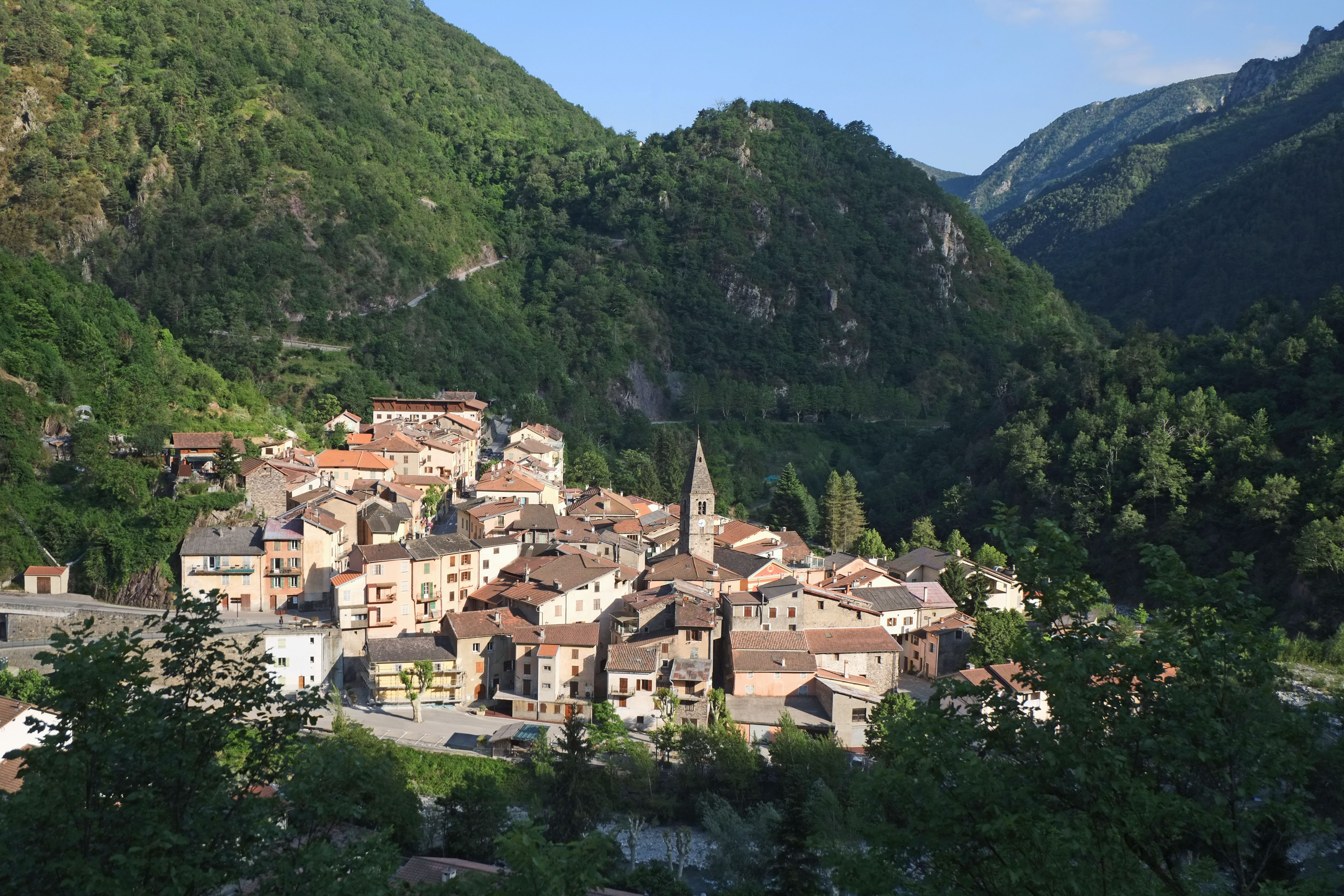 Vue du village de Saint-Sauveur-sur-Tinée depuis la route de Roubion un soir de juin.